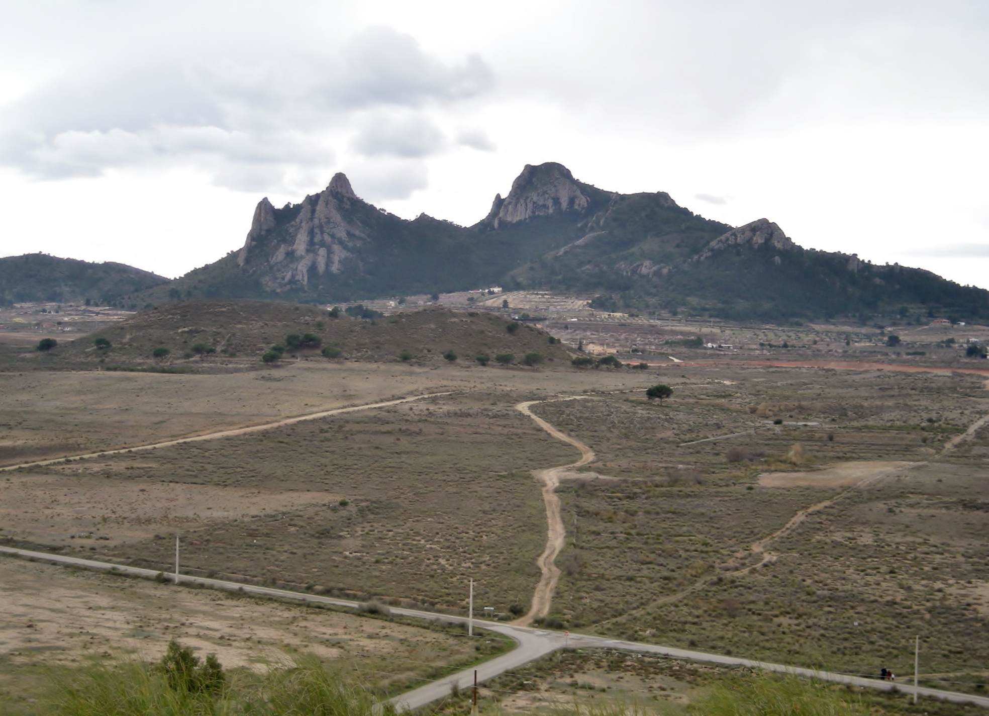 Vista de los Picachos de Cabrera desde el Cabezo de la Colonia de Santa Eulalia.